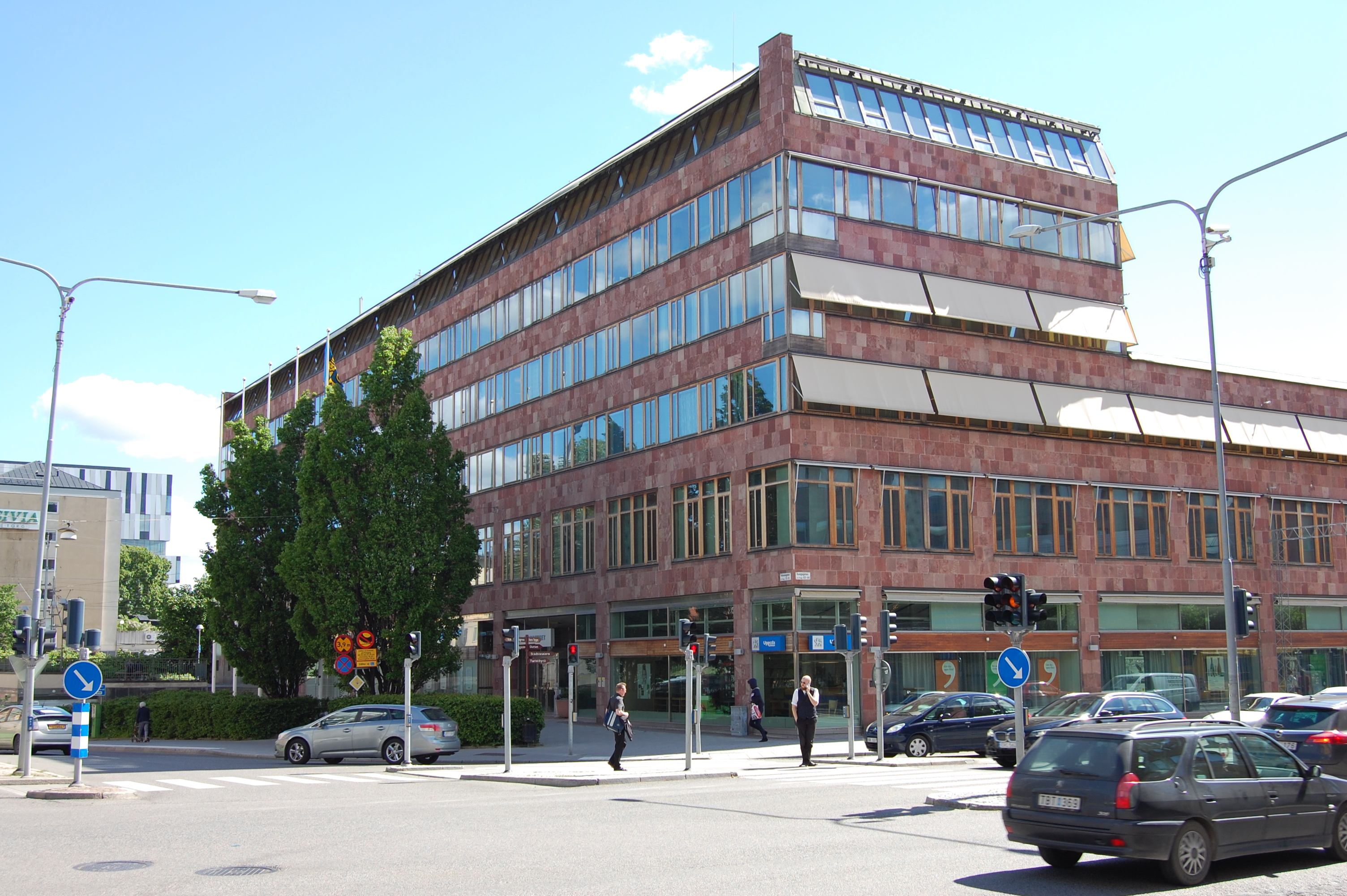 Stadshuset i Uppsala, sett från korsningen Kungsgatan/Vaksalagatan.